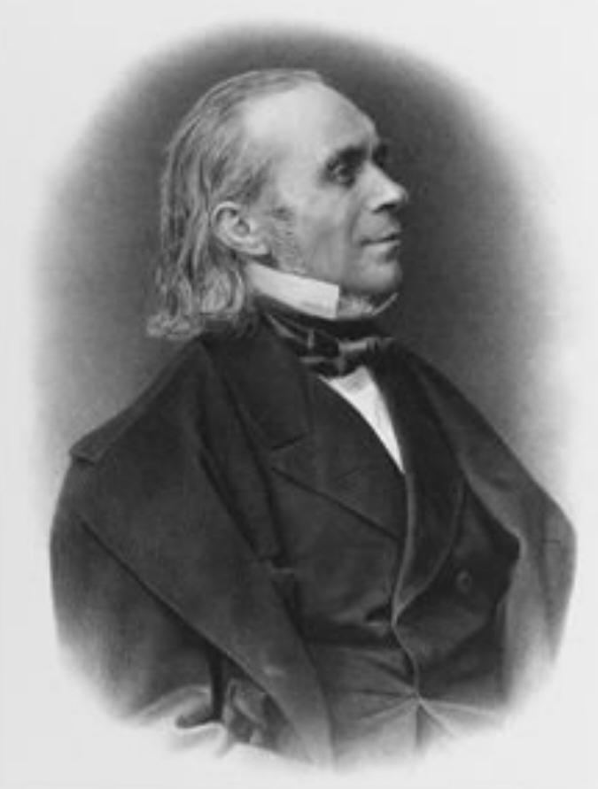 Louis-Antoine Garnier-Pages